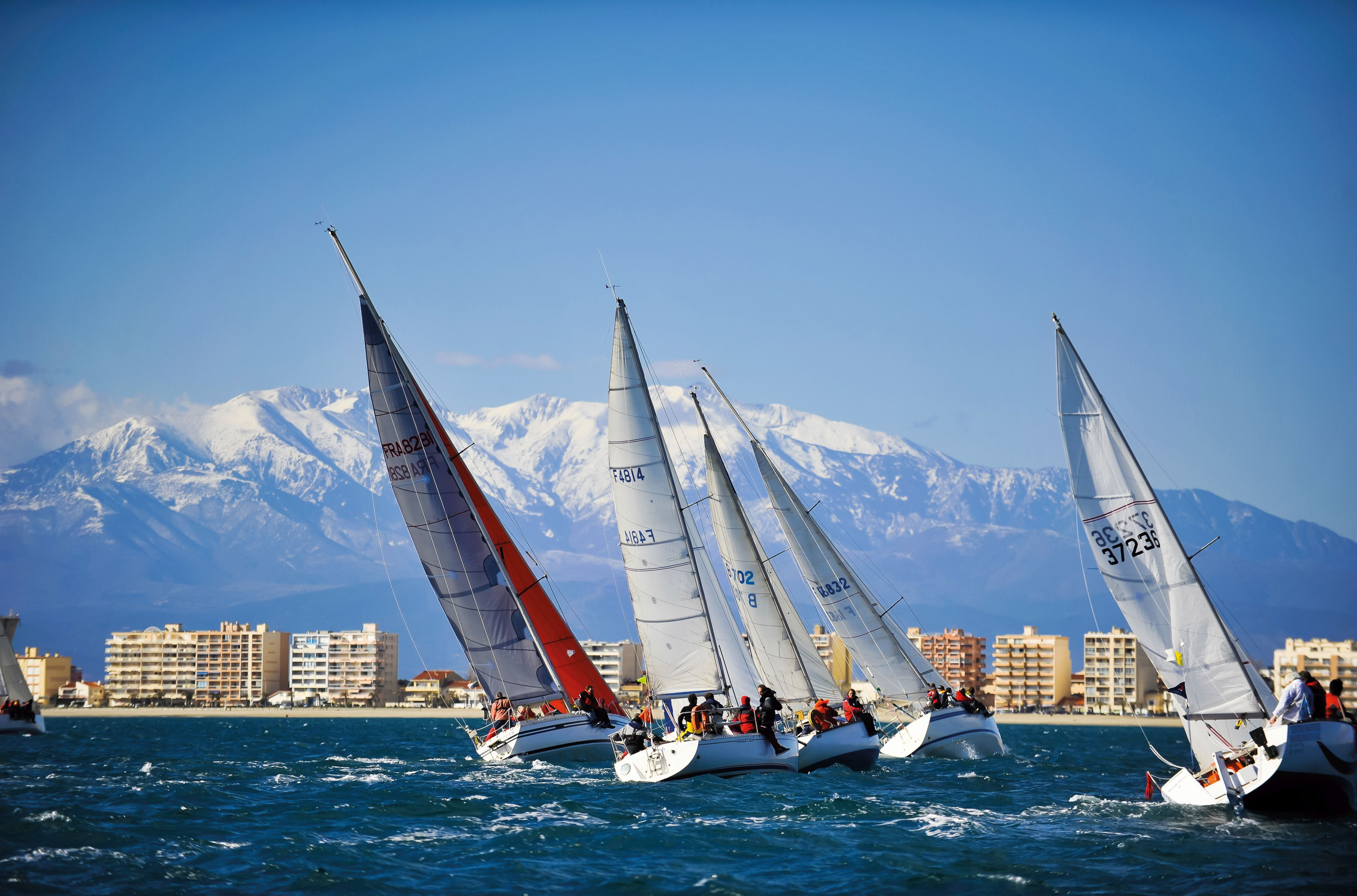 Régate au large de Canet-Plage et massif du Canigó